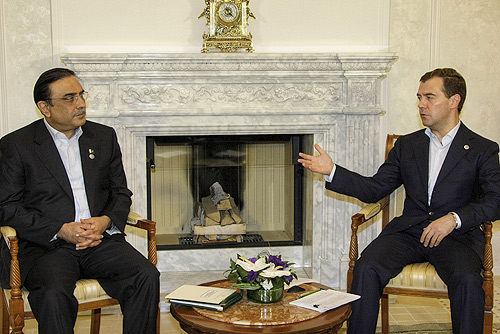 Дмитрий Медведев и президент Пакистана Асиф Али Зардари, Екатеринбург, 15 июня 2009 года.